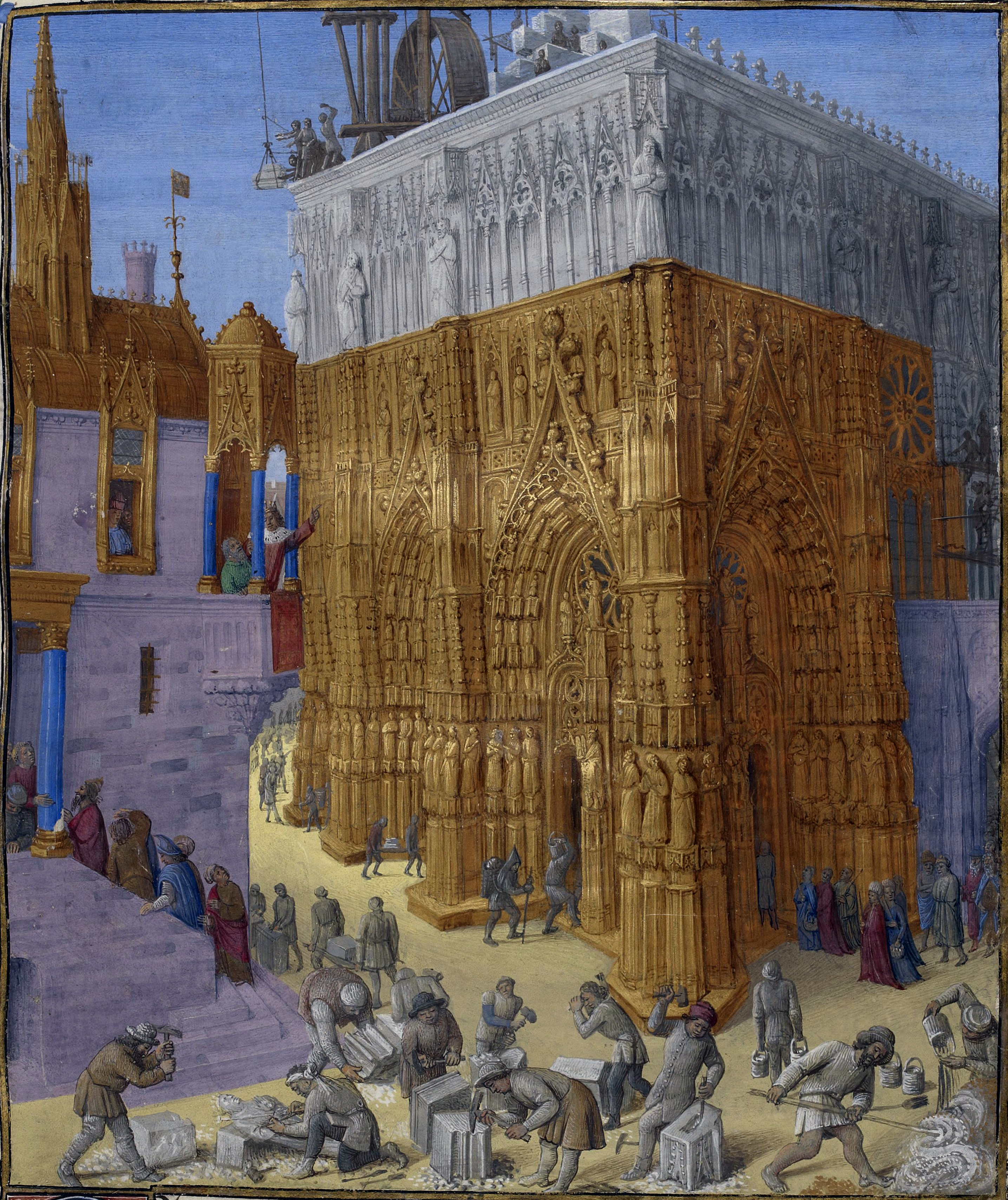 Construction du Temple de Jérusalem Flavius Josèphe, Les Antiquités judaïques, enluminure de Jean Fouquet, vers 1470-1475 Paris, BnF, département des Manuscrits, Français 247, fol. 163 (Livre VIII). À droite, un ouvrier, aidé de deux commis porteurs d'eau, prépare le mortier. Au centre au premier plan travaillent les tailleurs de pierres : deux dégrossissent les blocs avec des masses, deux travaillent à l'aide d'un ciseau, l'un creusant une mortaise, l'autre sculptant un bloc, auprès d'un compagnon parachevant une moulure à l’aide de son pic. Un imagier a posé près de lui marteau, ciseau et gouge pour prendre, à l'aide d'un compas, une mesure sur la statue qu'il ébauche. Un aide soulève péniblement un tambour de colonne prêt à la pose. Deux portefaix emportent sur un brancard une pierre. Des ouvriers, hotte sur le dos ou seau sur l'épaule, entrent et sortent du Temple par les portails à deux entrées, apportant le matériel nécessaire aux travaux dans l'œuvre. Sur un échafaudage, le long de la façade de droite entre les rosaces, on aperçoit les silhouettes de peintres terminant le revêtement doré.